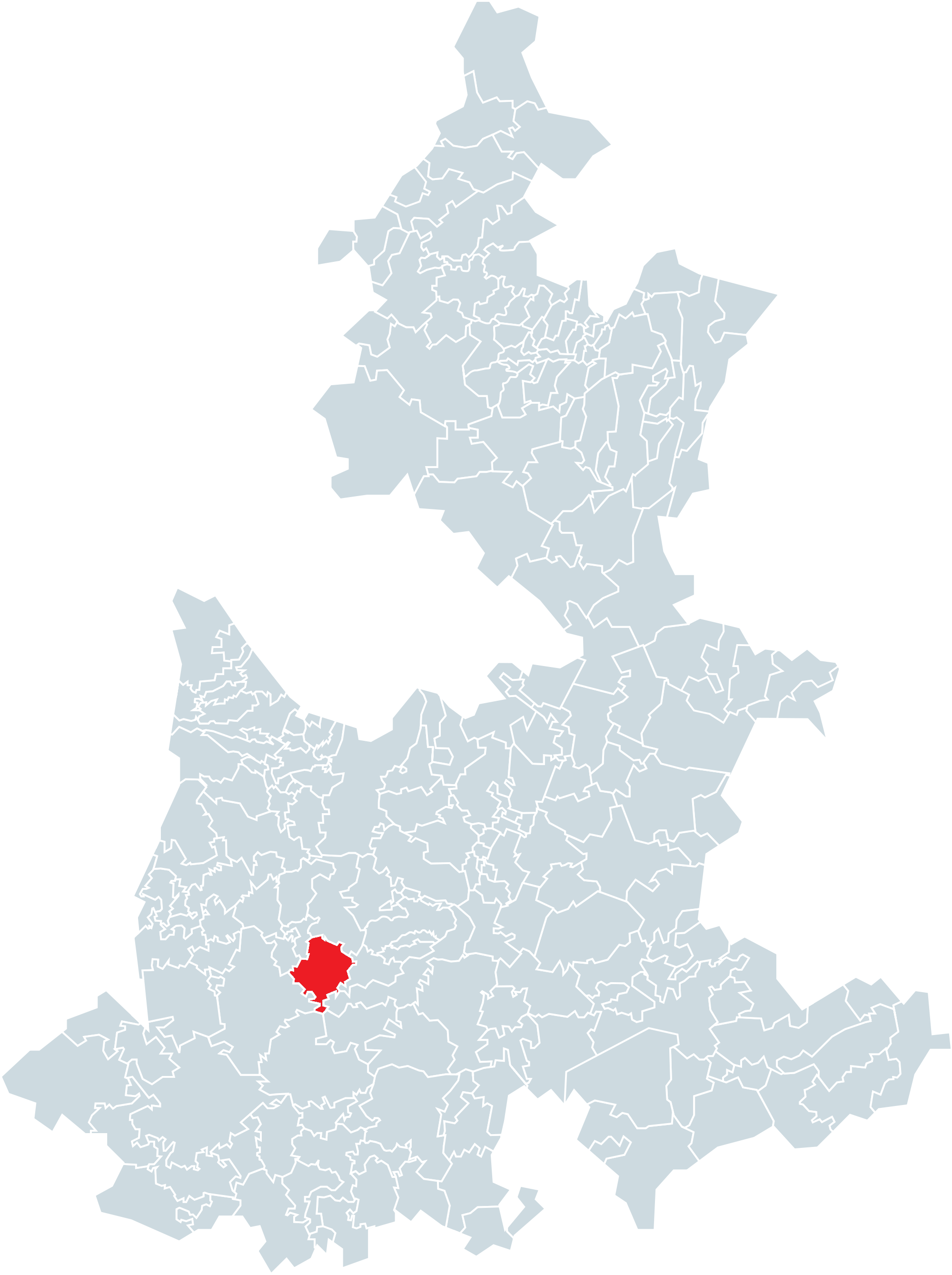 Municipio de Ahuatlán